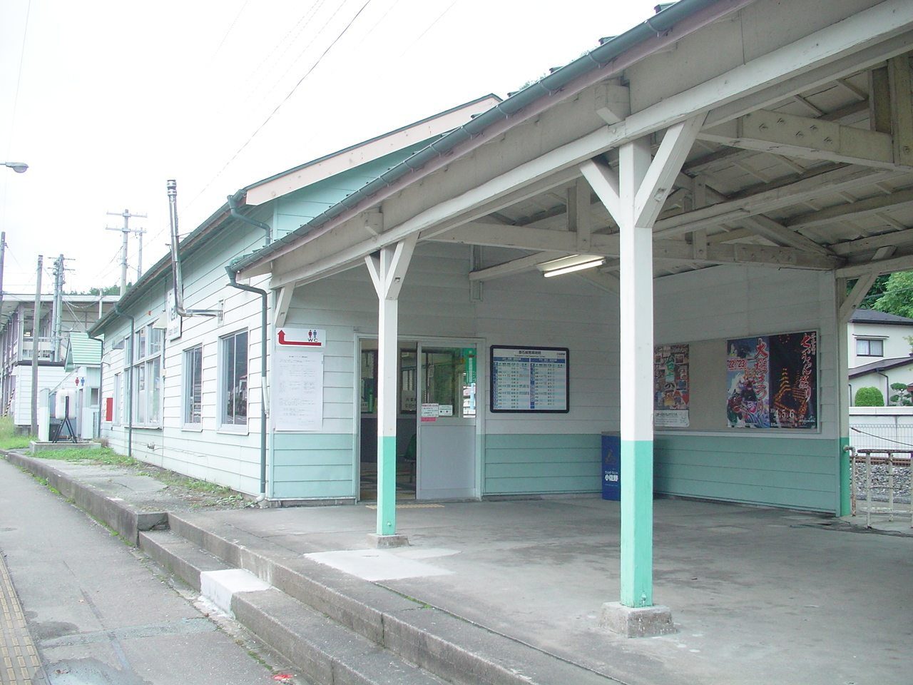 （小佐野駅）